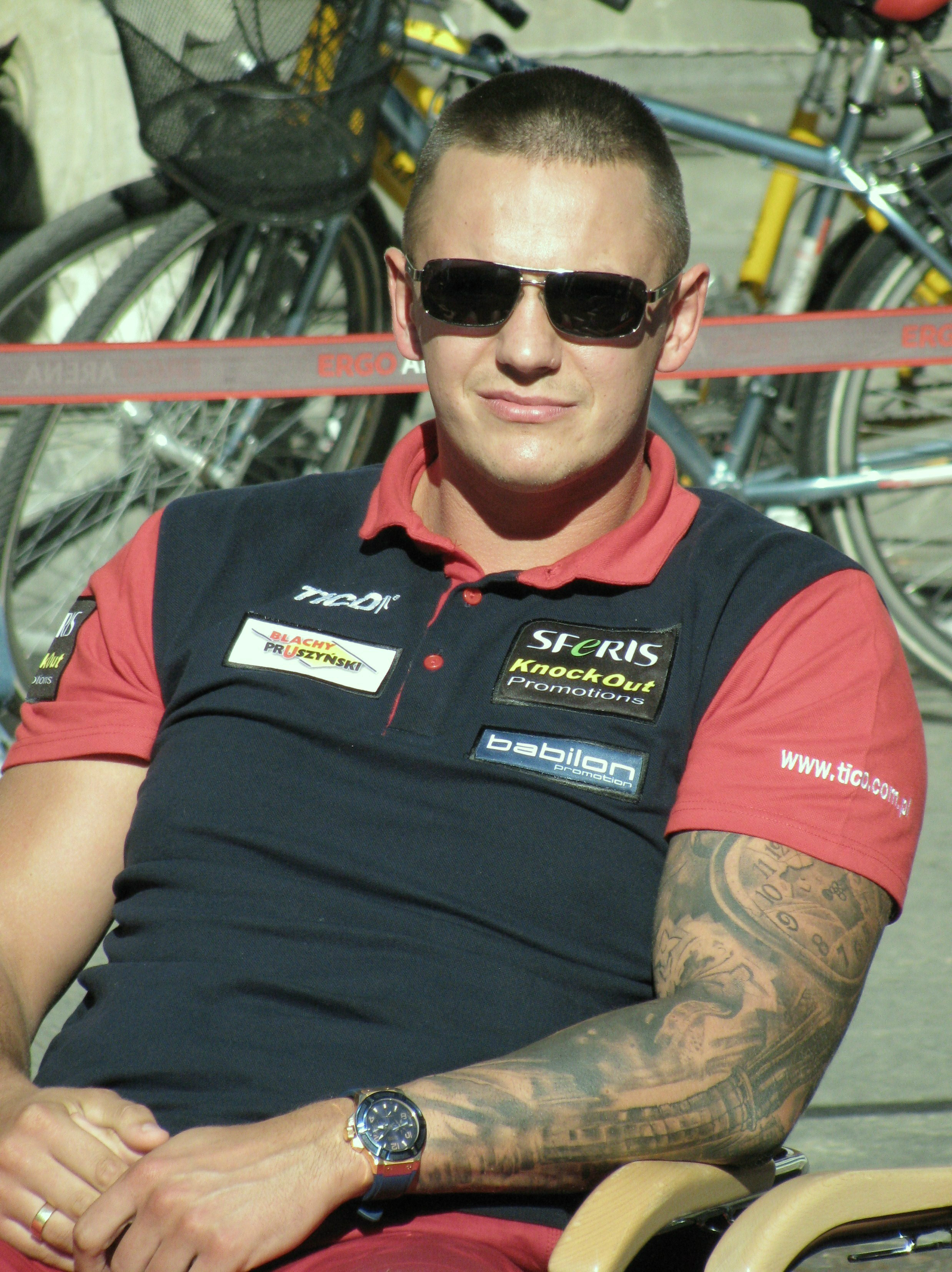 Andrzej Wawrzyk (zawodowy pięściarz wagi ciężkiej) w Gdańsku. Prezentacja przed walką w Ergo Arenie.